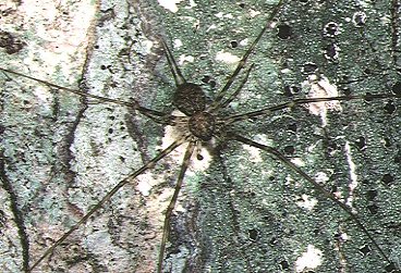 male Hersilia okinawaensis from Okinawa.